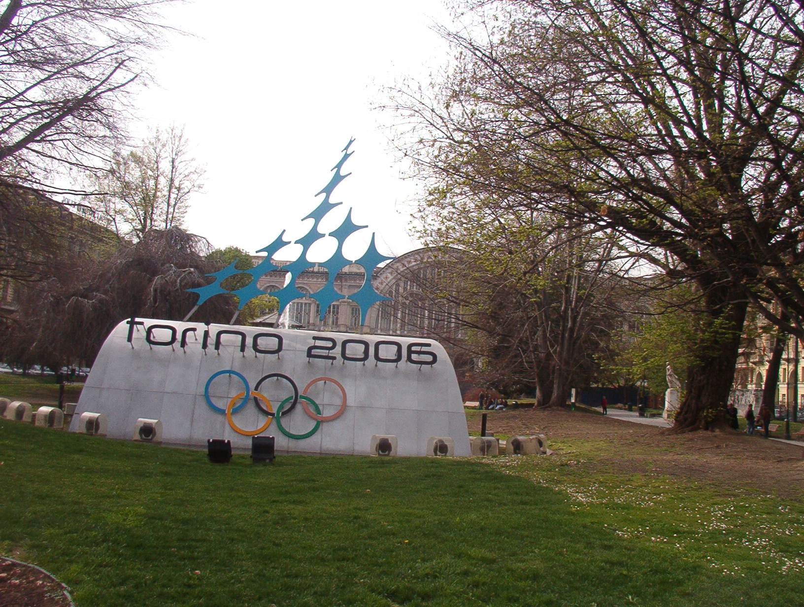 Piazza Carlo Felice - Torino - Italia